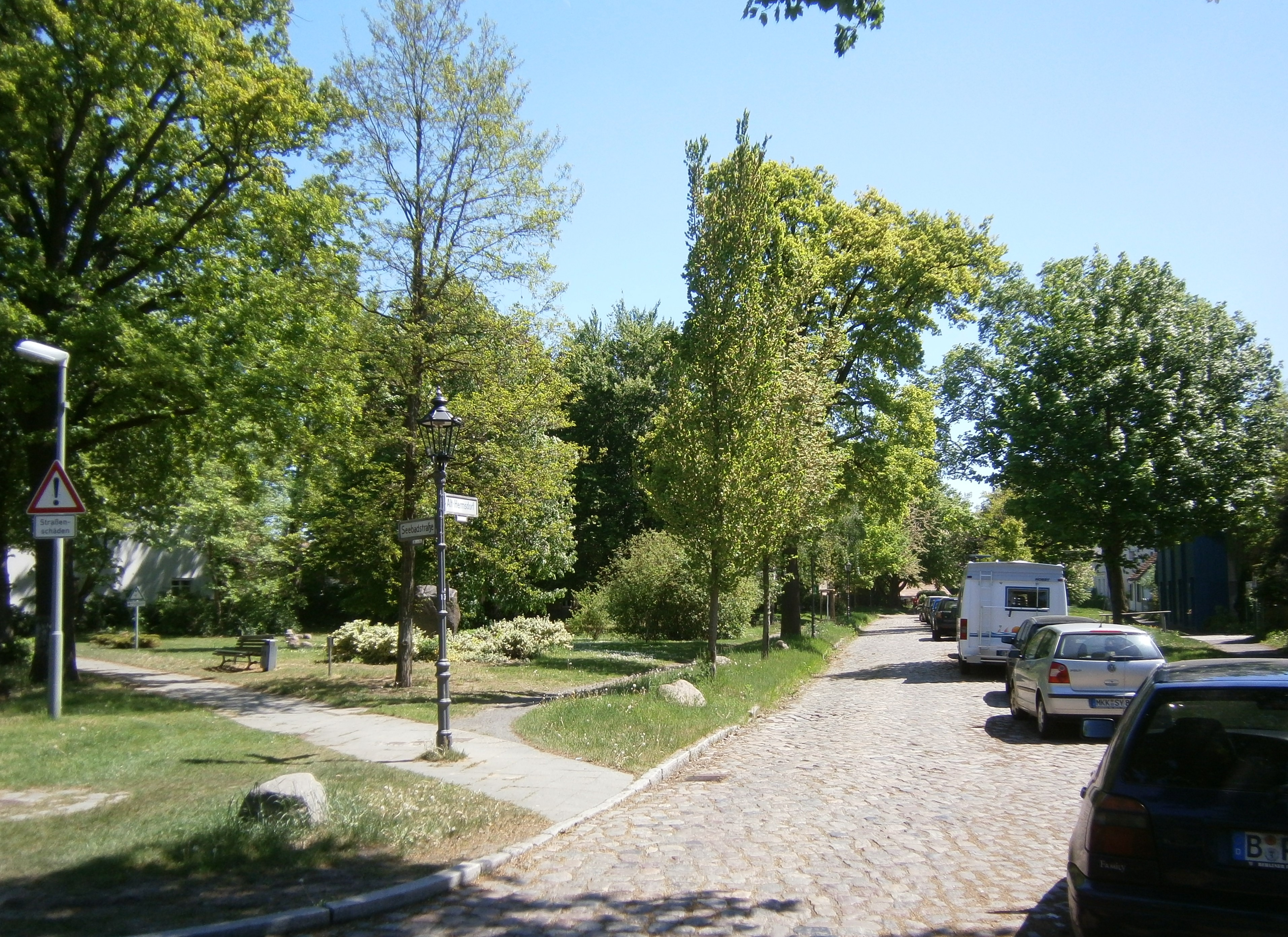 AltHermsdorf ist eine Straße im Ortsteil Berlin-Hermsdorf (hier in Blickrichtung: Ost)